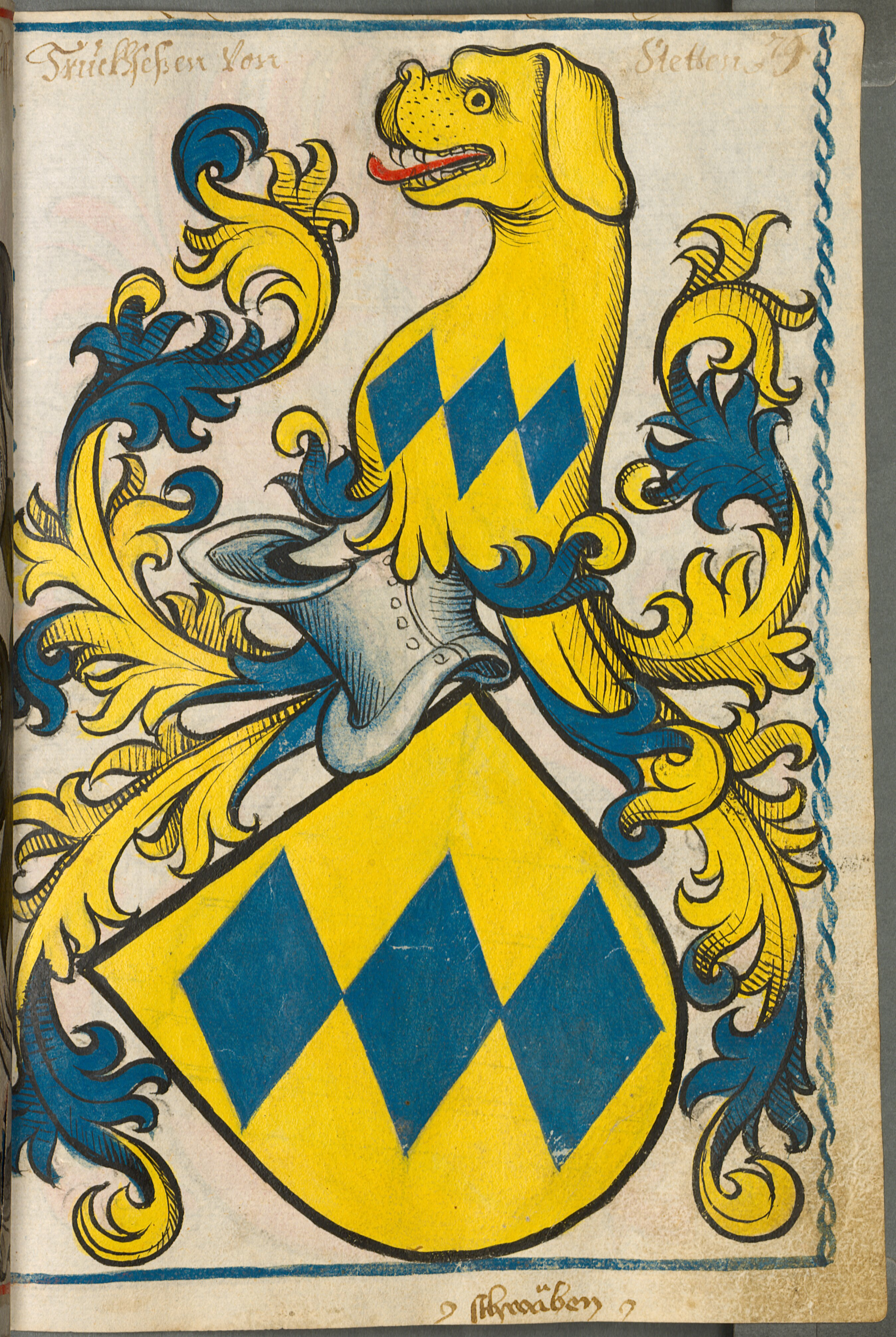 Scheibler'sches Wappenbuch, älterer Teil; Seite 79 Truckhseßen von Stetten Schwaben